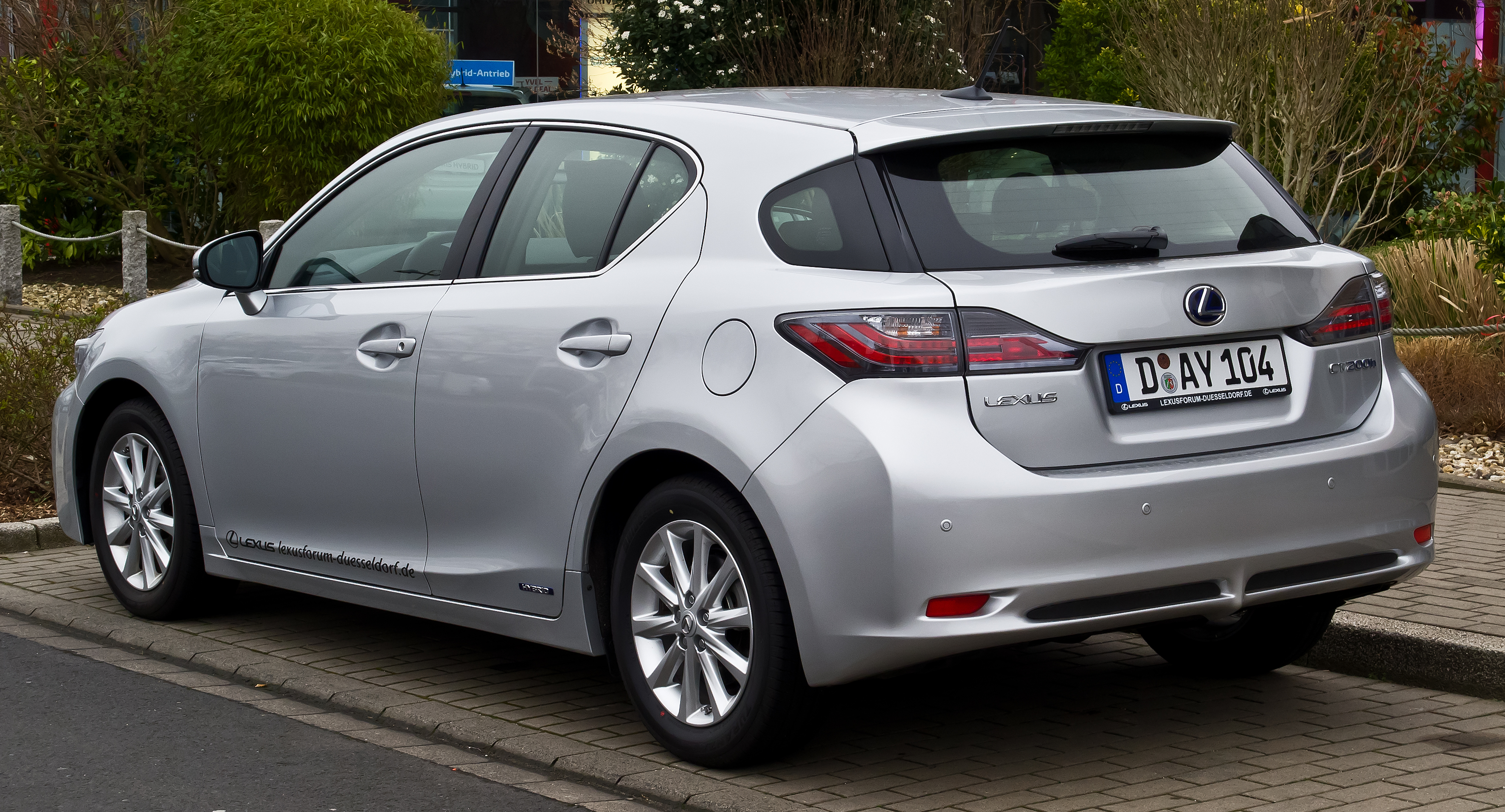 Lexus CT 200h Executive Line (ZWA10)